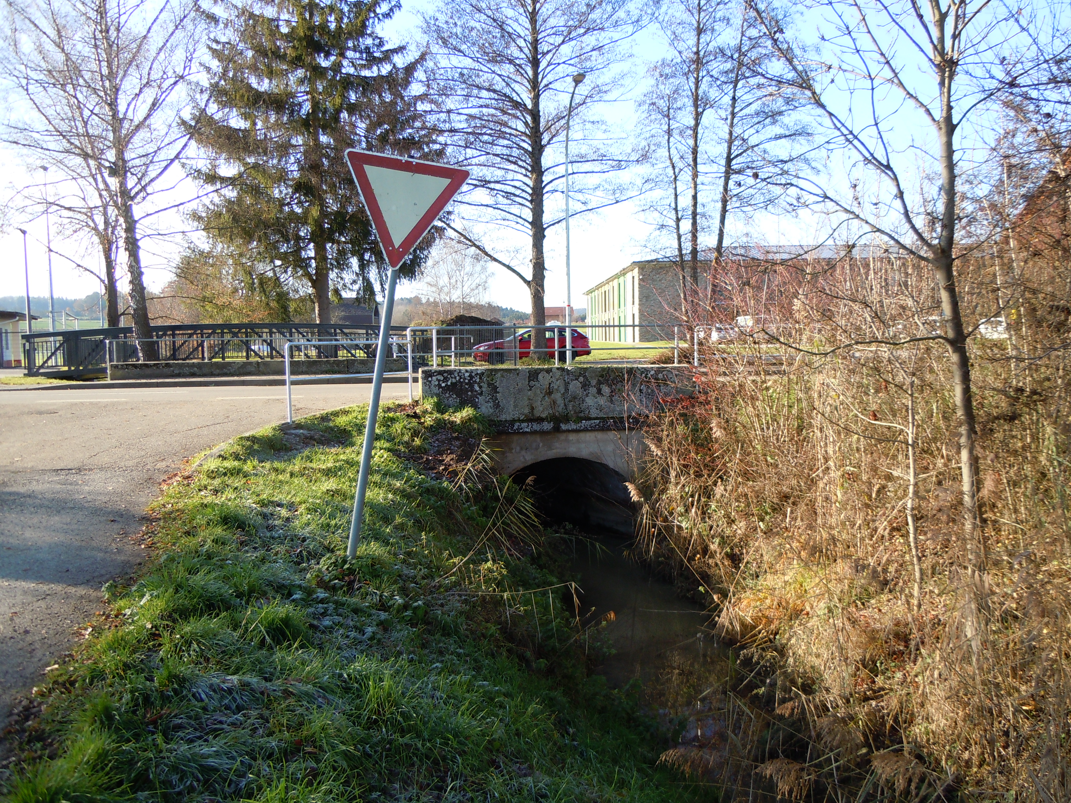 Brücke über den Eutinger Talbach in Eutingen im Gäu, Blickrichtung West